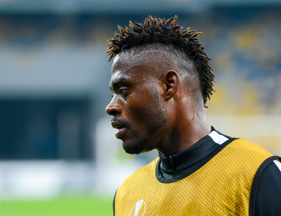 Kasim Adams Nuhu beim Europa-League-Spiel Dynamo Kiew gegen BSC Young Boys